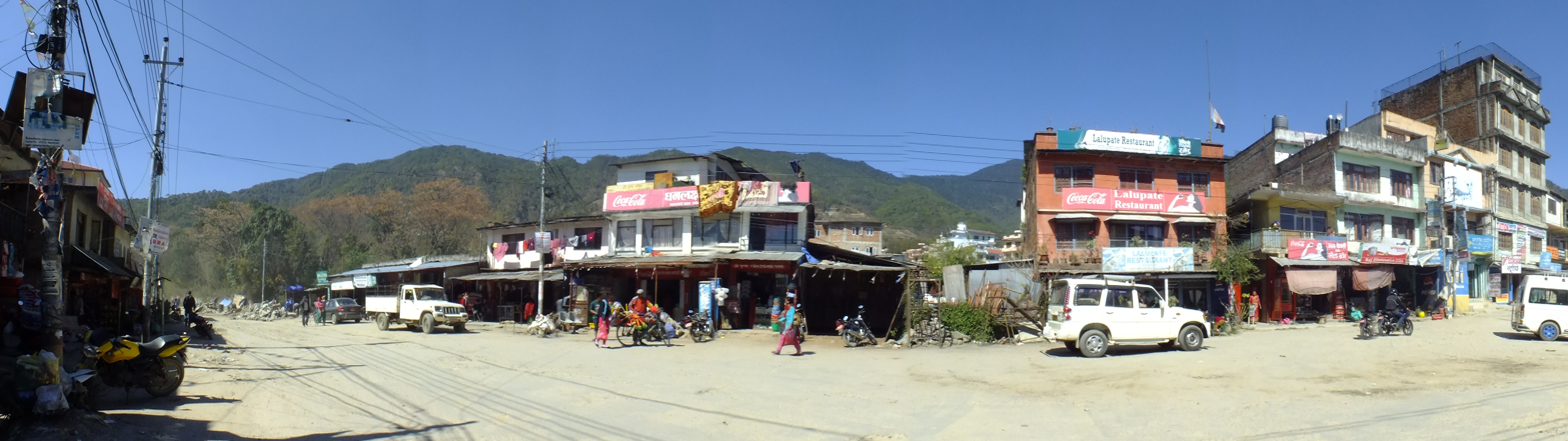 Budhanilkantha,Nepal-ブダニールカンタ寺院